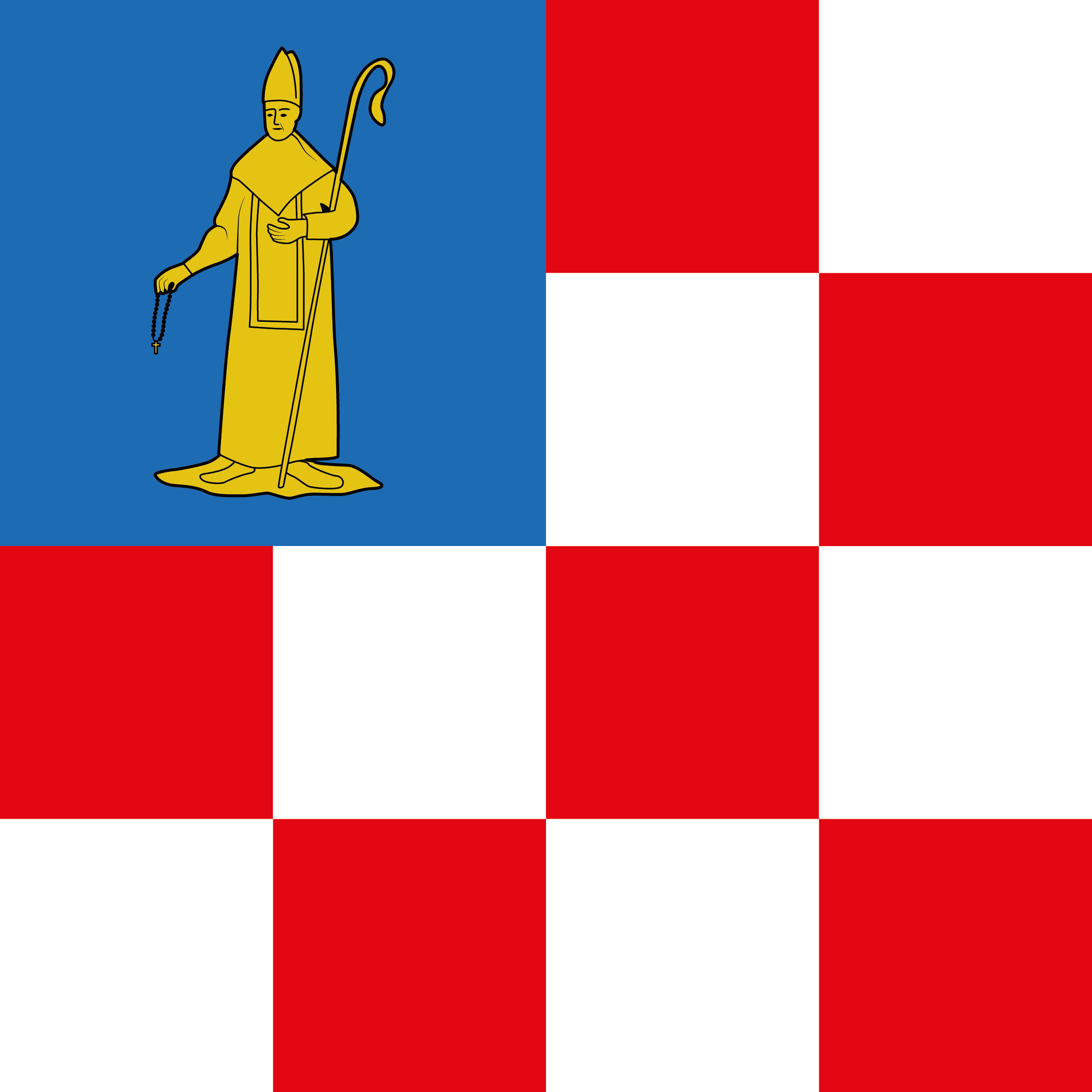 De vlag van gemeente Bakel-Milheeze